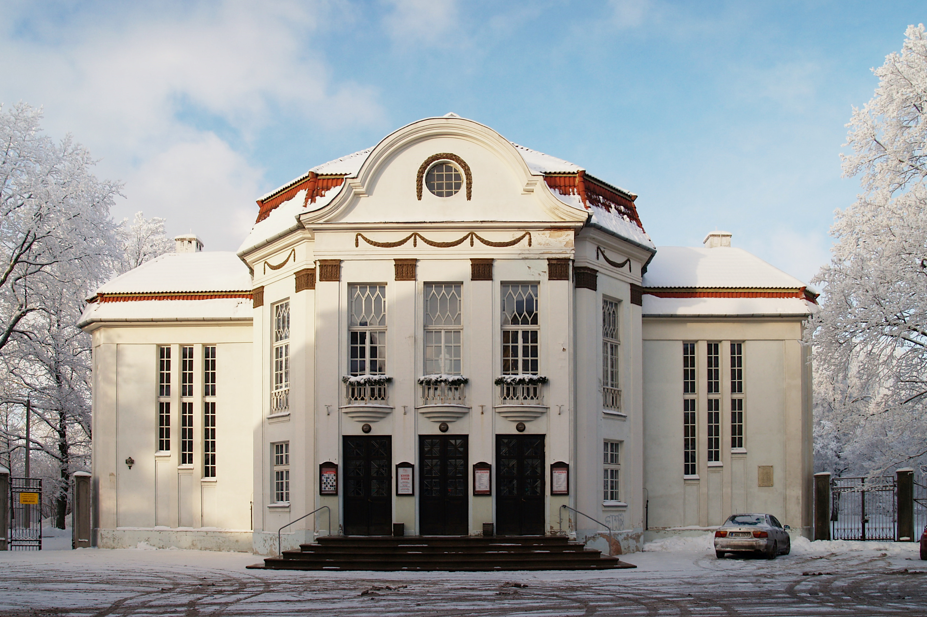 Vanemuise väike maja